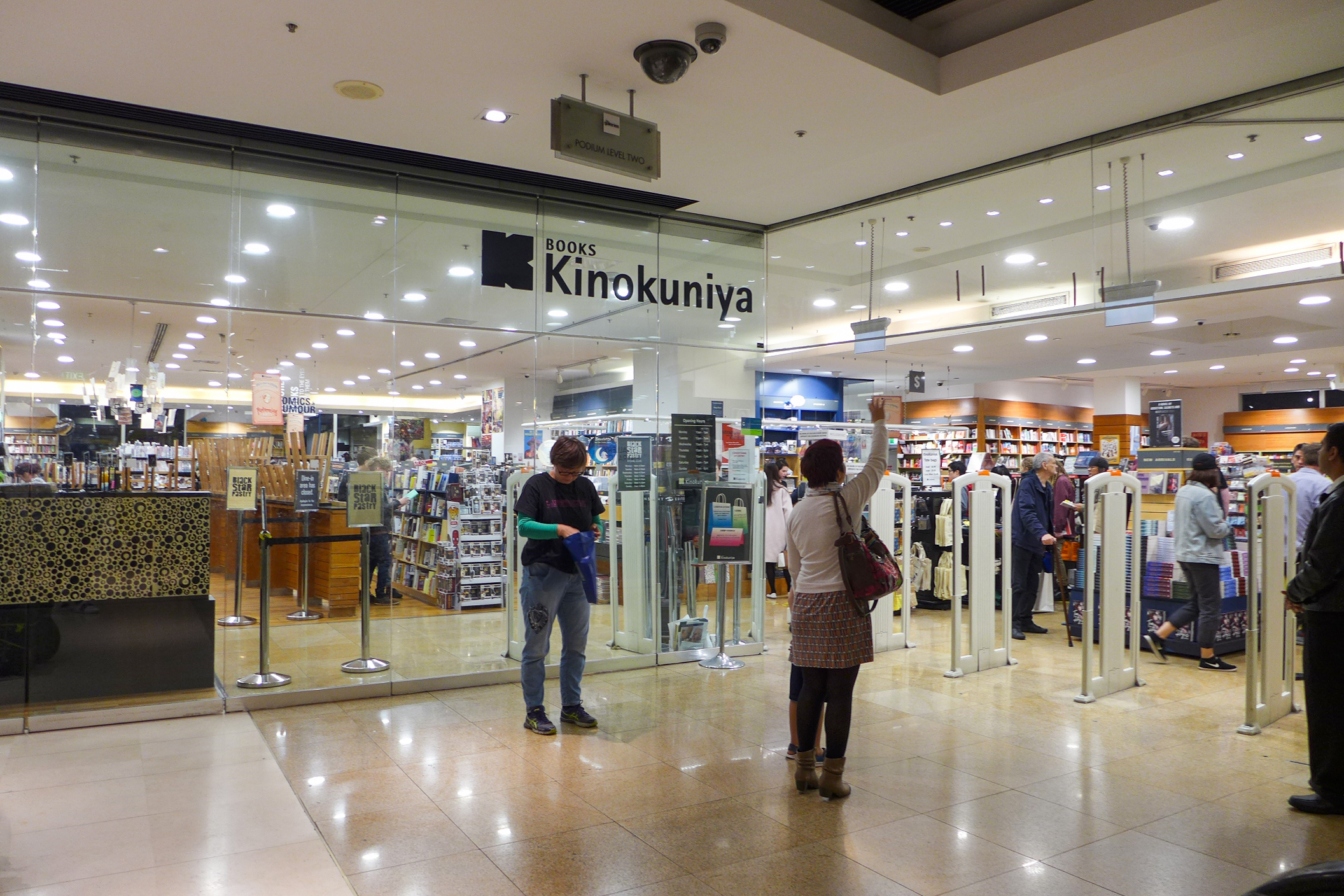 Books Kinokuniya in Sydney